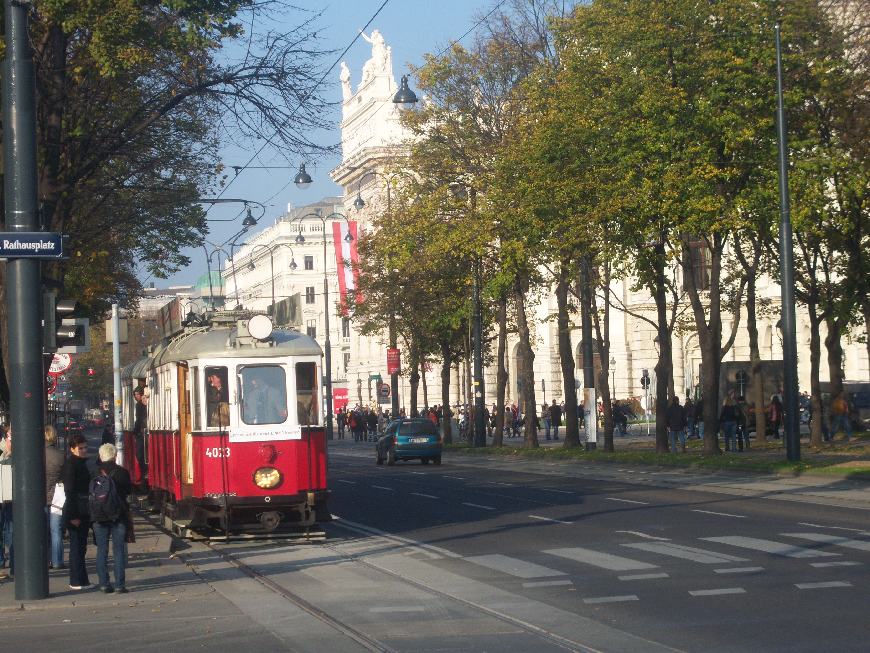 Historische Straßenbahn am Ring